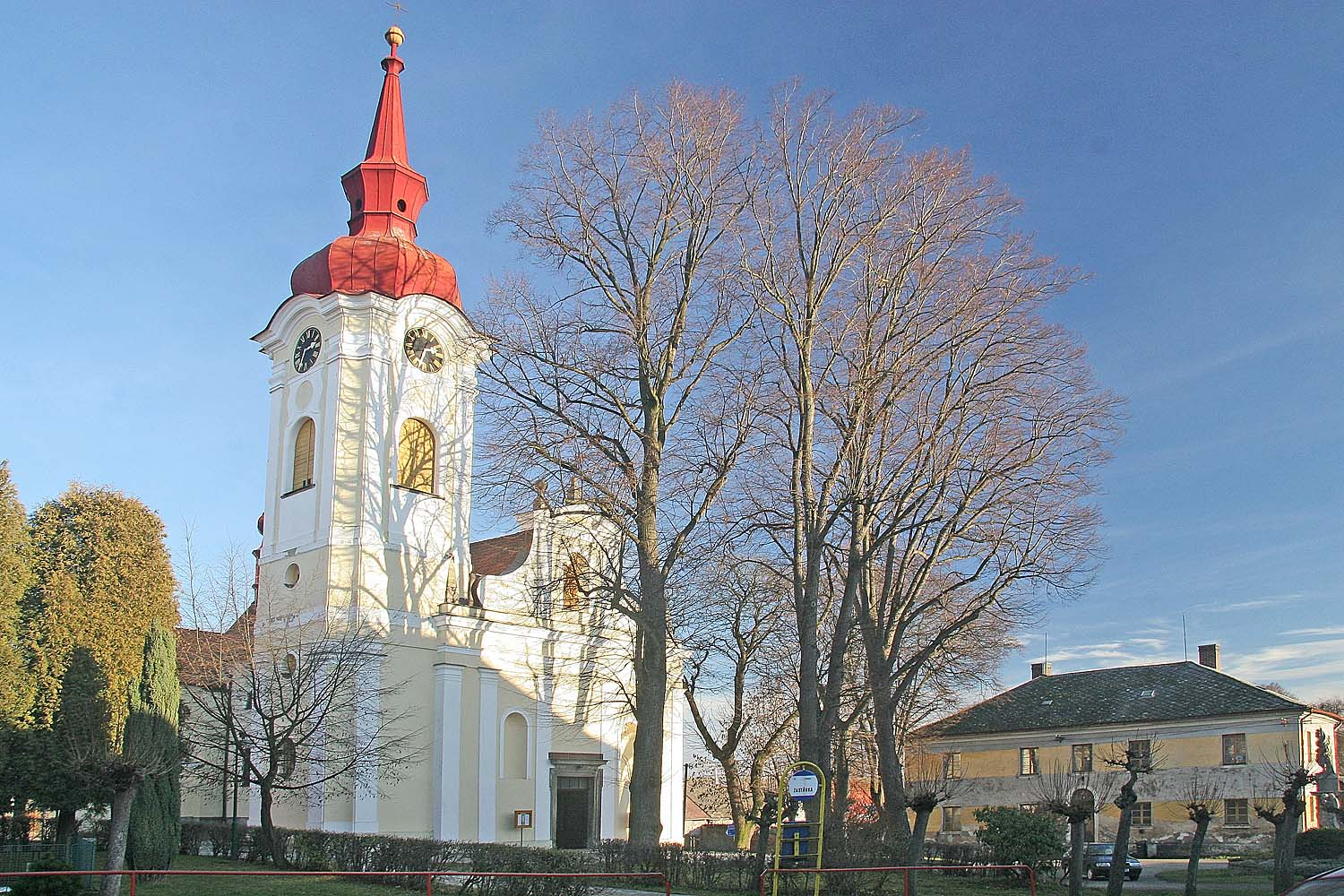 Kostel Nanebevzetí Panny Marie v městě Habry, district Havlíčkův Brod autor: Prazak date: 15. 12. 2006